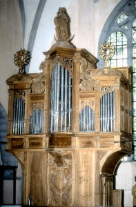 Orgue de l'église d'Orgelet,un des plus anciens du Jura, reconstruit par Marin Carouge en 1724, restauré par Bernard Aubertin en 1985.